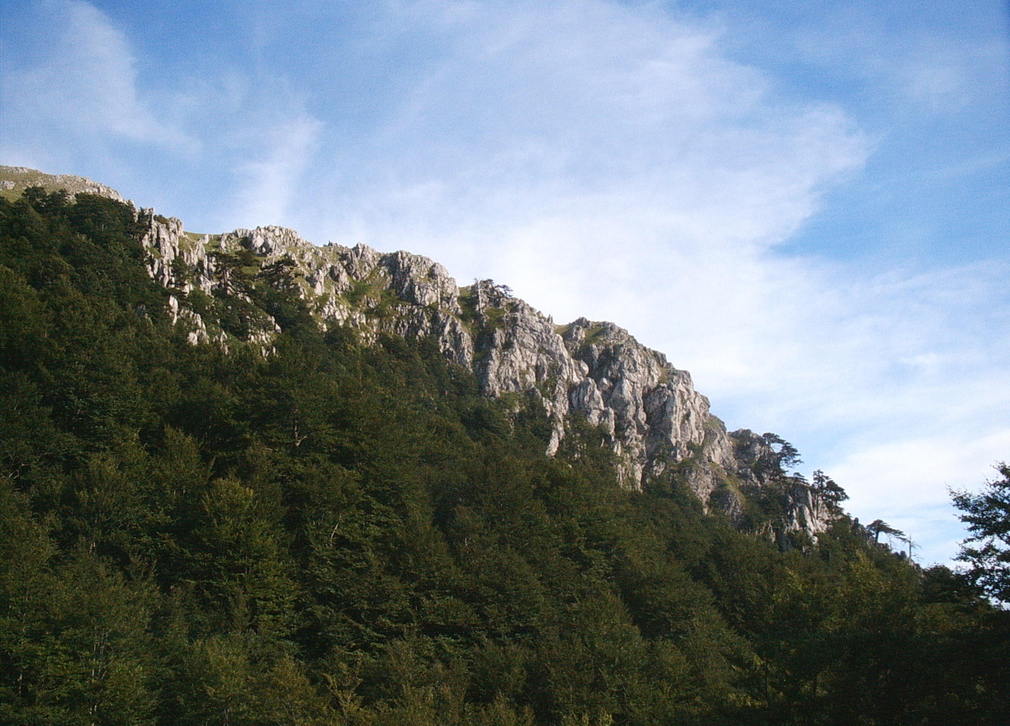 Parco del Pollino. foto di vinc81.agosto 2006